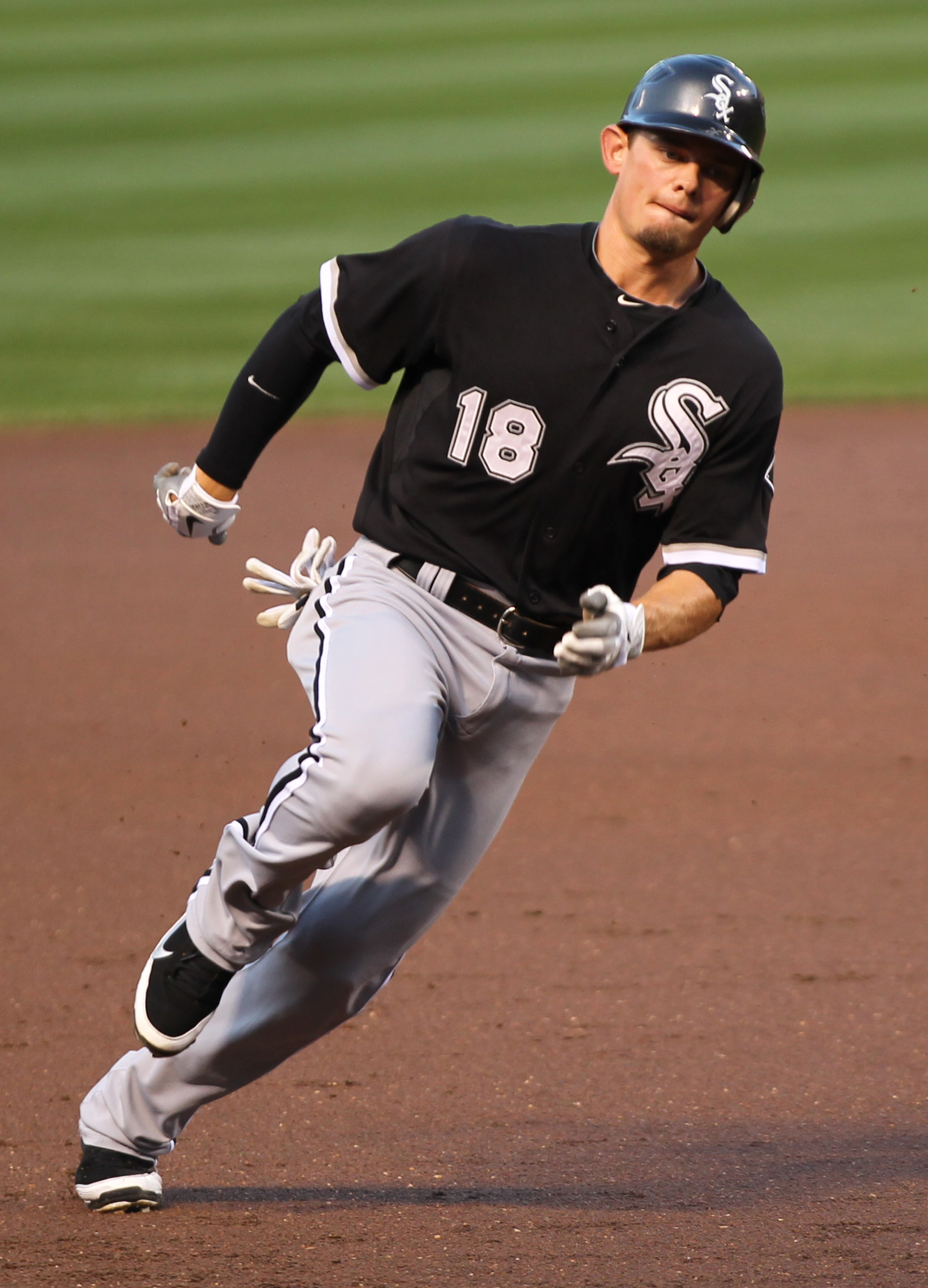 Brent Lillibridge